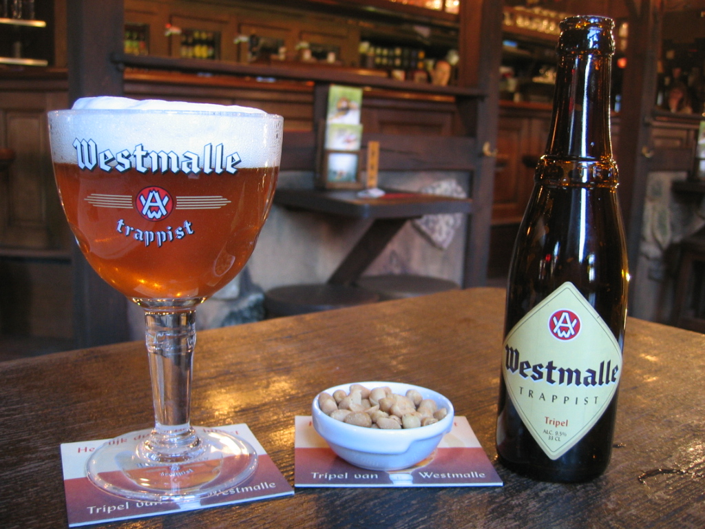 Bière Westmalle trapiste